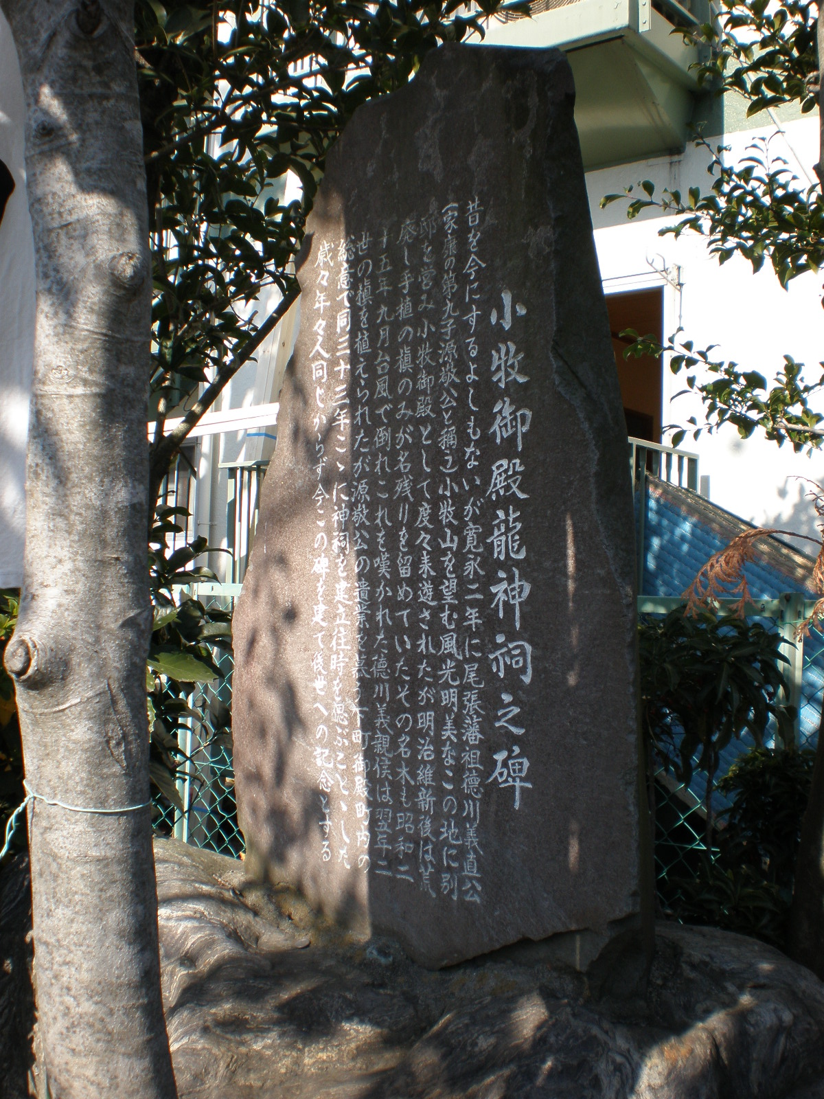 愛知県小牧市にある御殿龍神建設の経緯を記した石碑